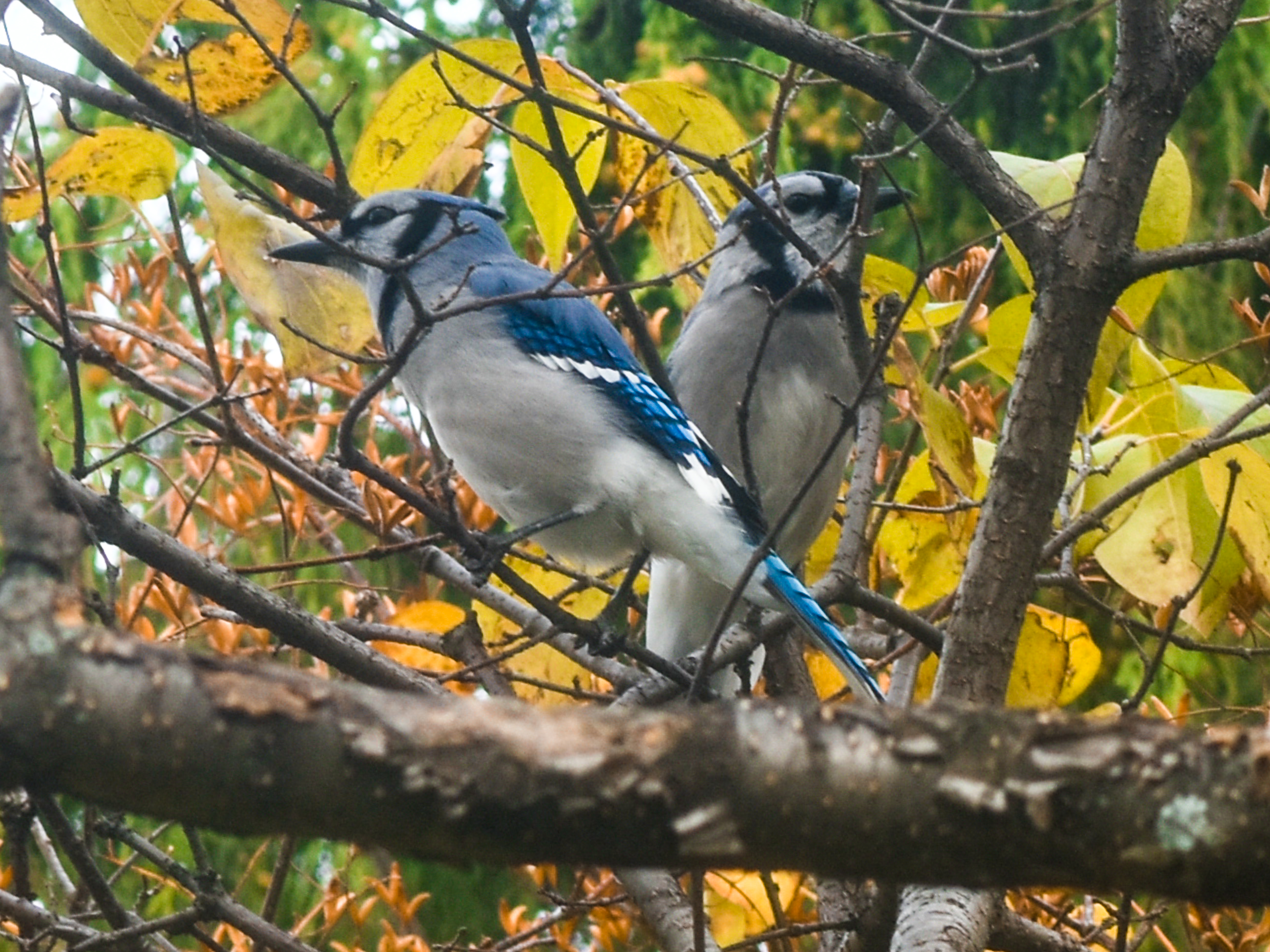 Wade Lagoon Blue Jays